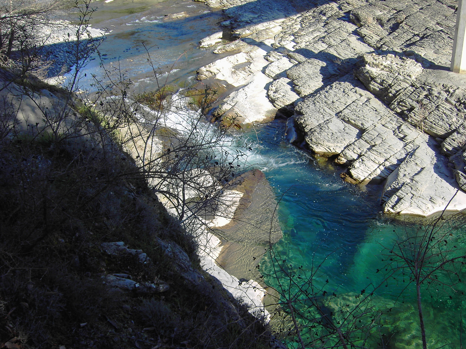 Las pozas de Puyarruego, en Huesca, España.